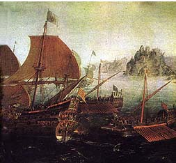 Quandre que representa les naus de Colom partint del port de Palos de la Frontera